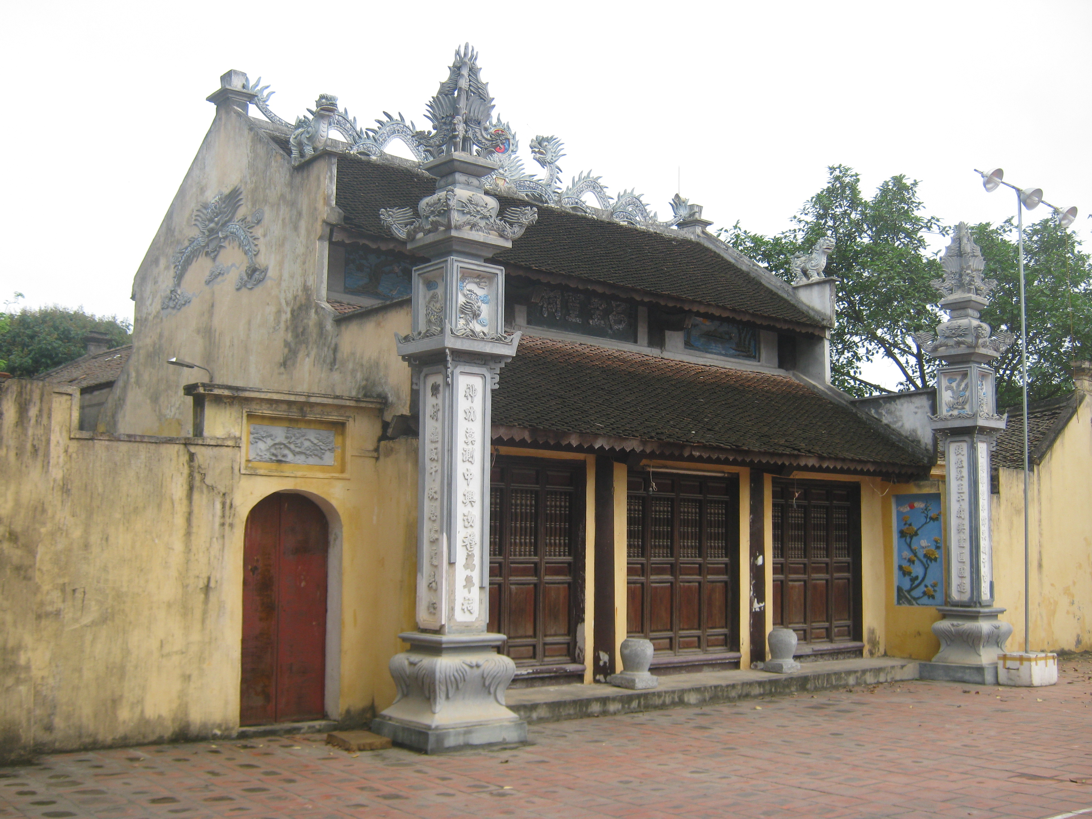 Đình Bến ở Phụng Công, Văn Giang, Hưng Yên - Nơi thờ sứ quân Lã Đường - vị tướng thời vi:12 sứ quân.